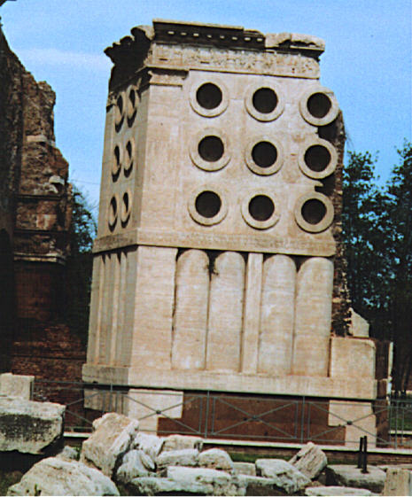 Eigene Fotografie. 'Grabmal des Eurysaces' in Rom im Jahr 2004. / Deutlich erkennbar die merkwürdigen runden Löcher des Gebäudes, die vermutlich Knettröge für Brotteig darstellen sollen. Auf der rechte Seite fehlt, wie gut erkennbar, ein Teil des Gebäudes. Hier war ursprünglich die Hauptfassade mit dem Porträt des Bäckers Eurysaces und seiner Gemahlin.